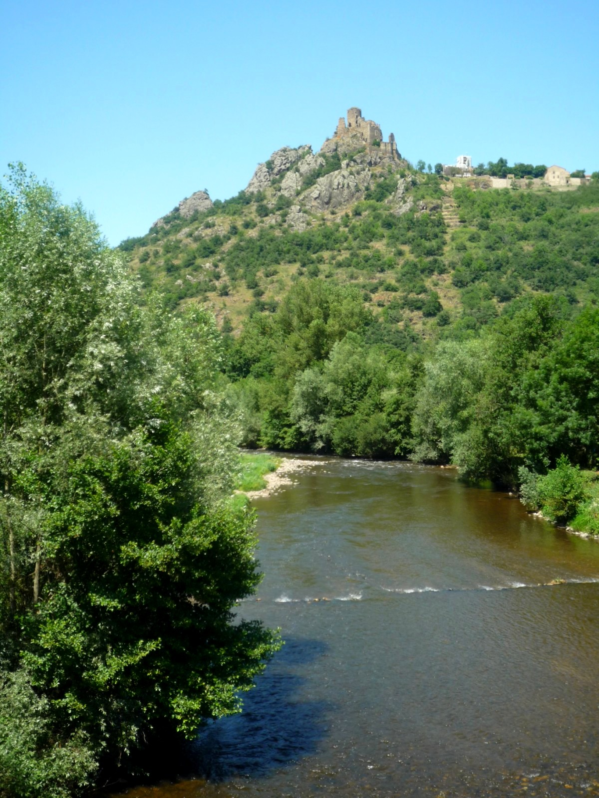 La rivière Alagnon et le château de Léotoing (Haute-Loire) France